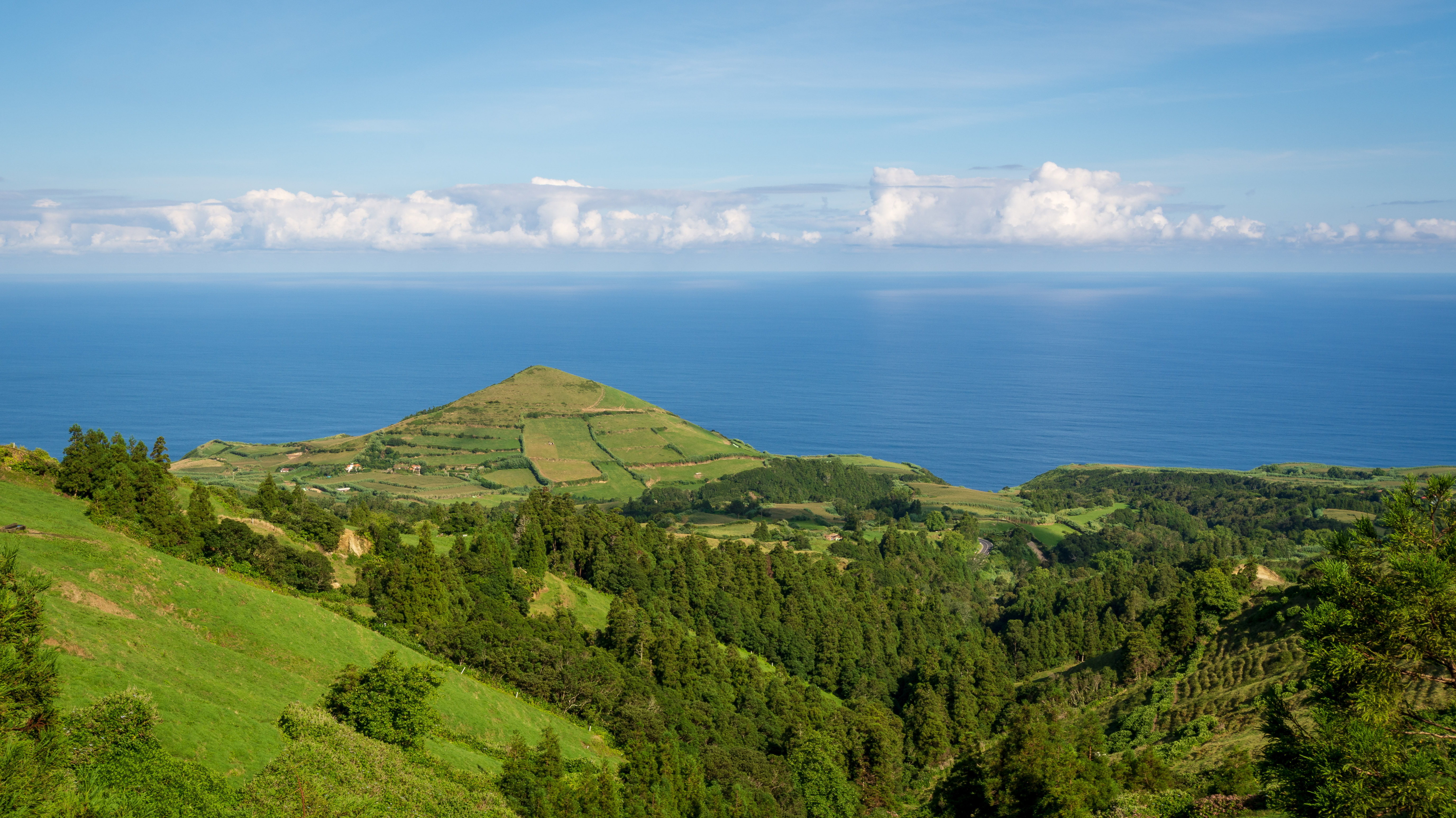 20170913_acores_0009